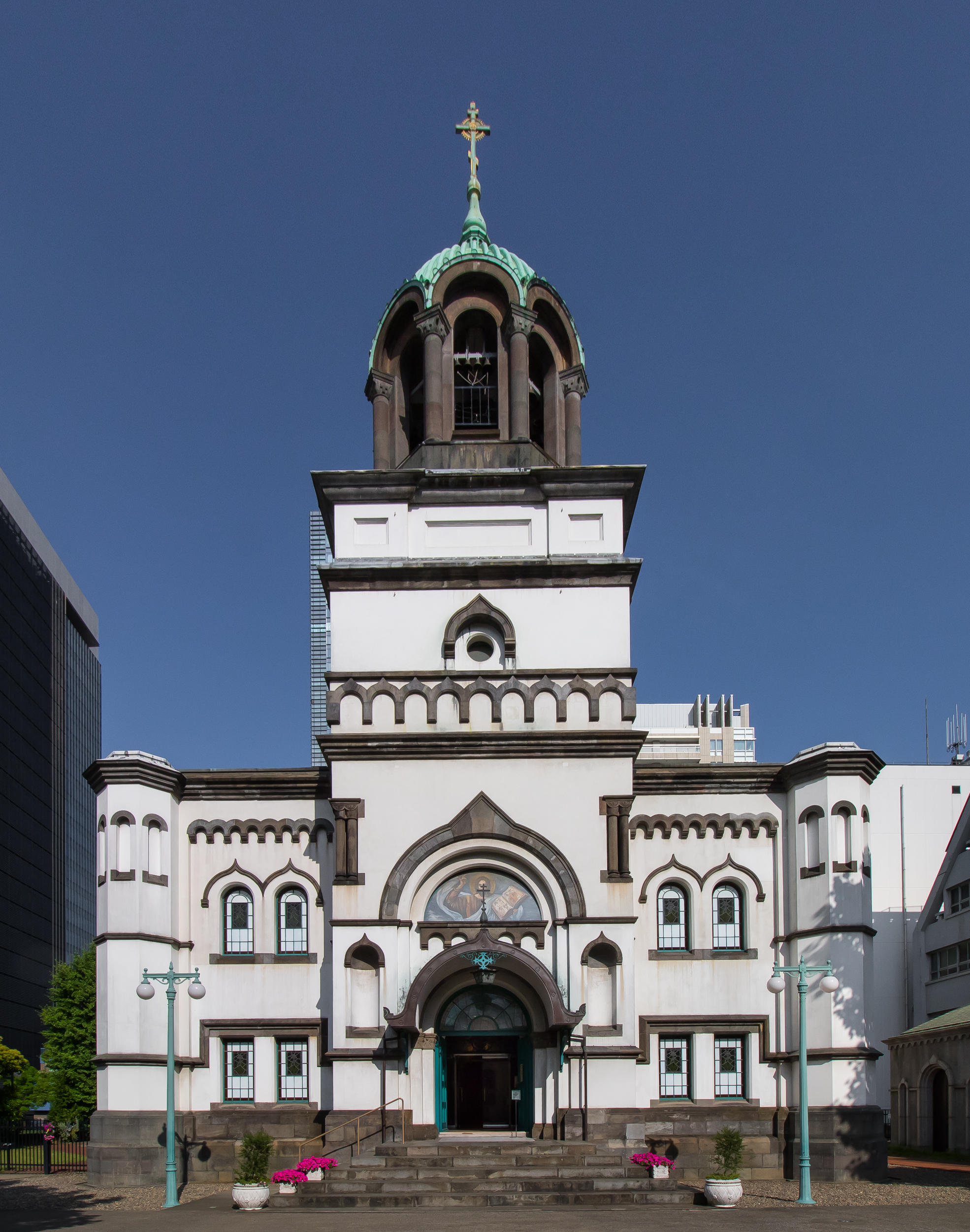 東京復活大聖堂、「ニコライ堂」（重要文化財）